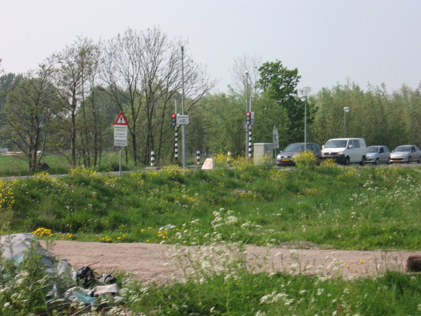 verkeersdosseerinstallatie sluipverkeer Delft-Schiedam